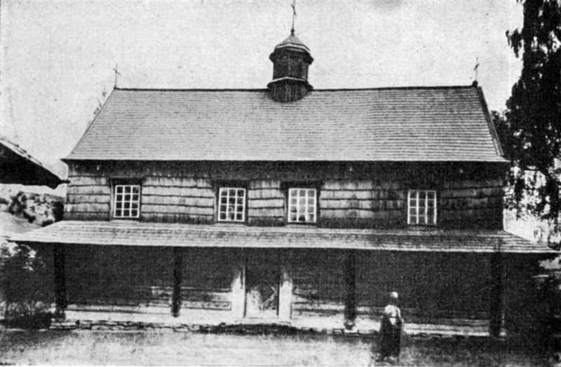 Церква Святого архистратига Михаїла